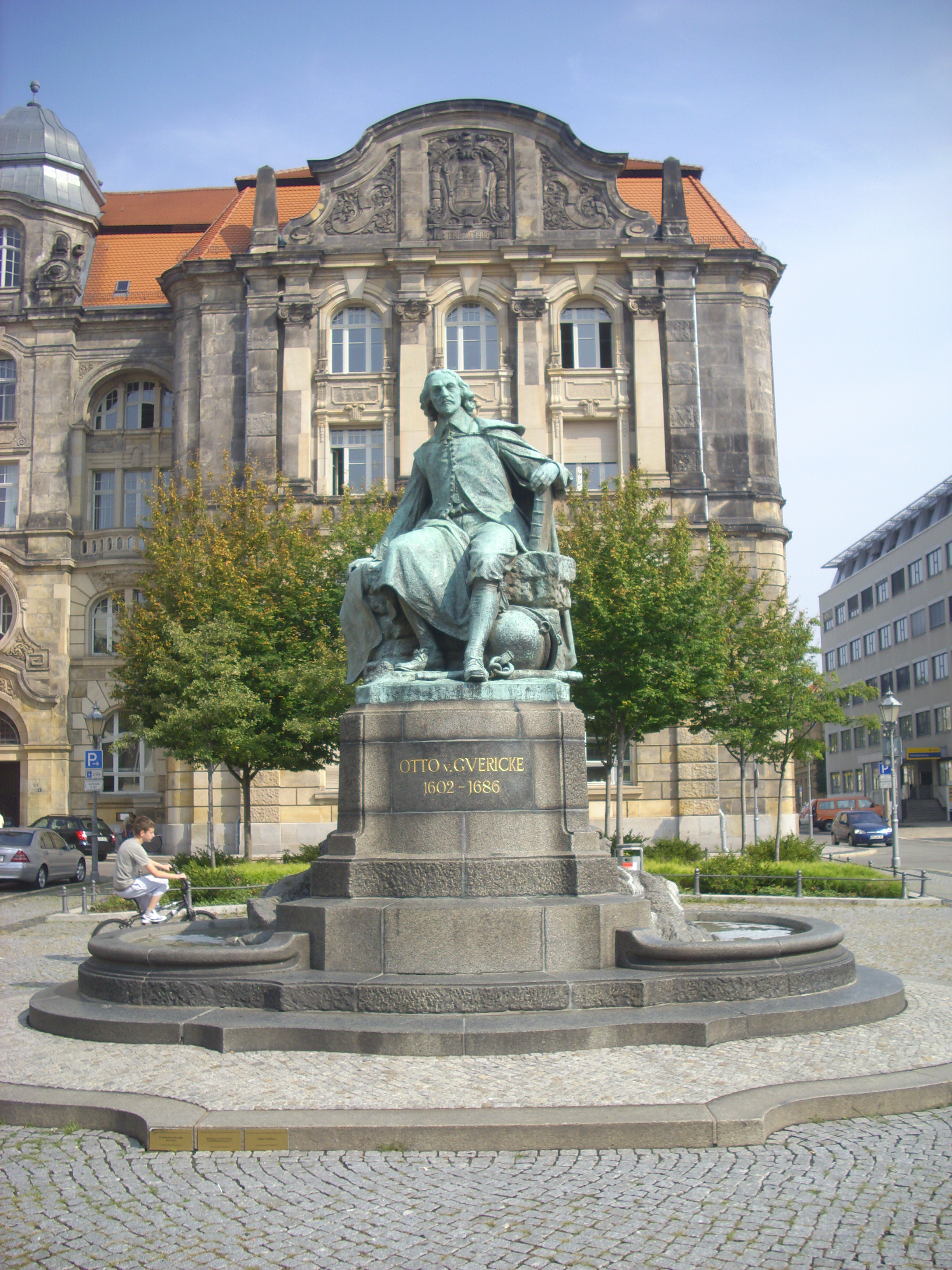 Otto-von-Guericke-Denkmal in Magdeburg